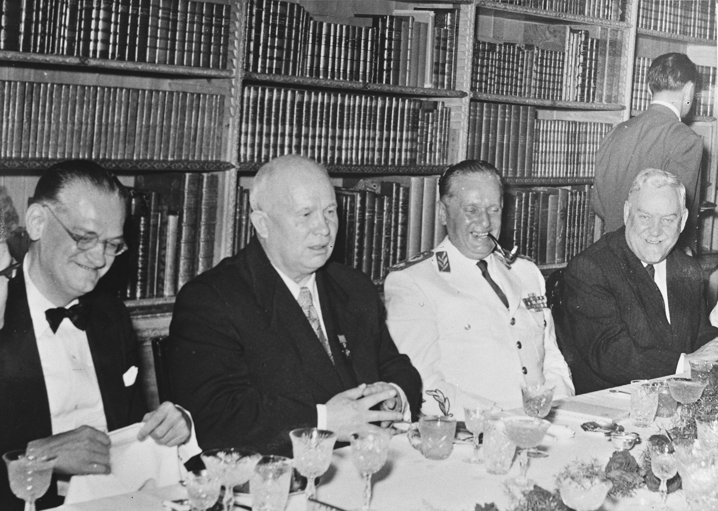 Collectie / Archief : Fotocollectie Anefo Reportage / Serie : [ onbekend ] Beschrijving : Russische bezetters Joegoslavie Datum : 31 mei 1955 Trefwoorden : bezetters Fotograaf : Fotograaf Onbekend / Anefo Auteursrechthebbende : Nationaal Archief Materiaalsoort : Glasnegatief Nummer archiefinventaris : bekijk toegang 2.24.01.09 Bestanddeelnummer : 907-1635